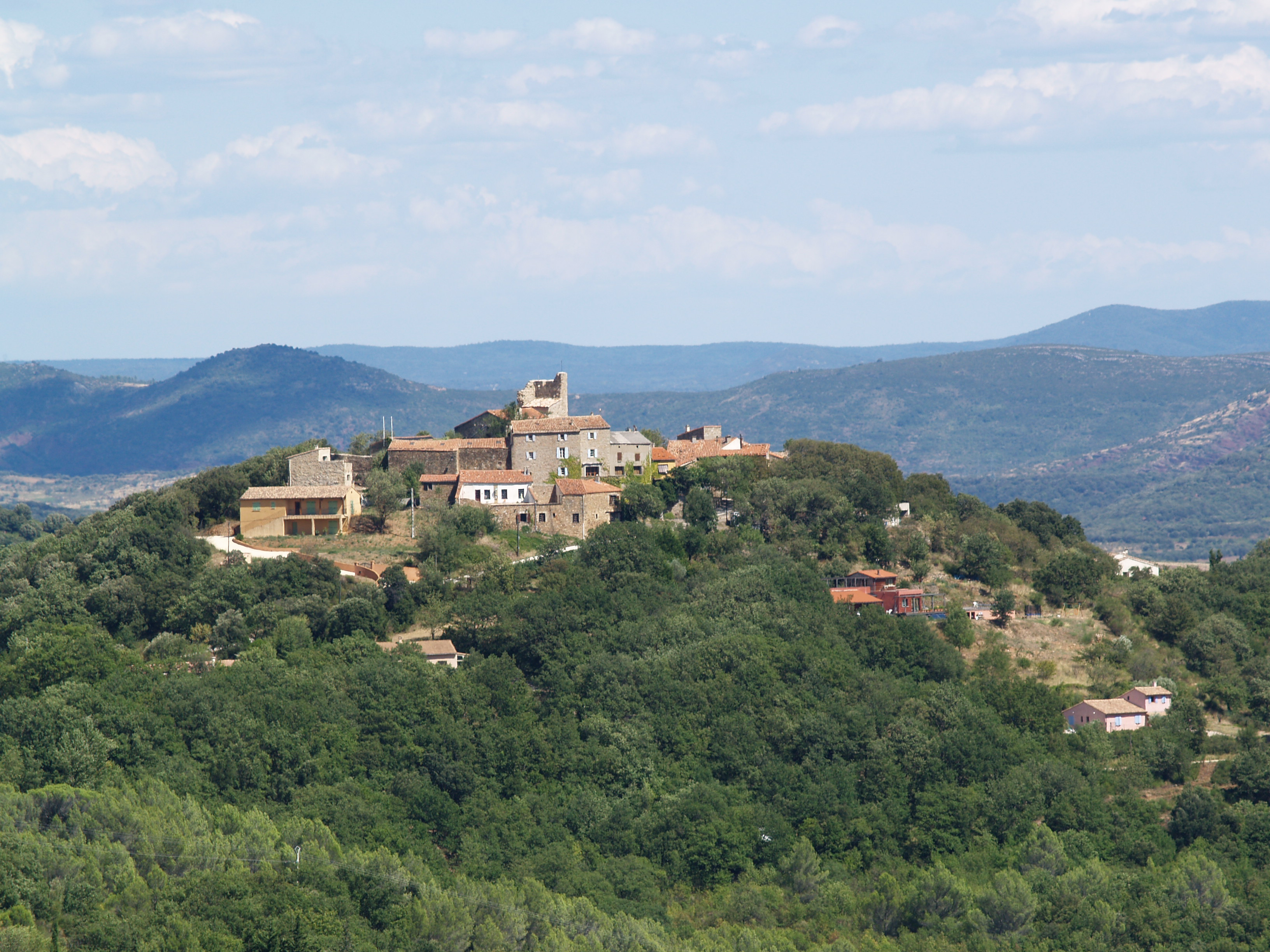 d'Olmet